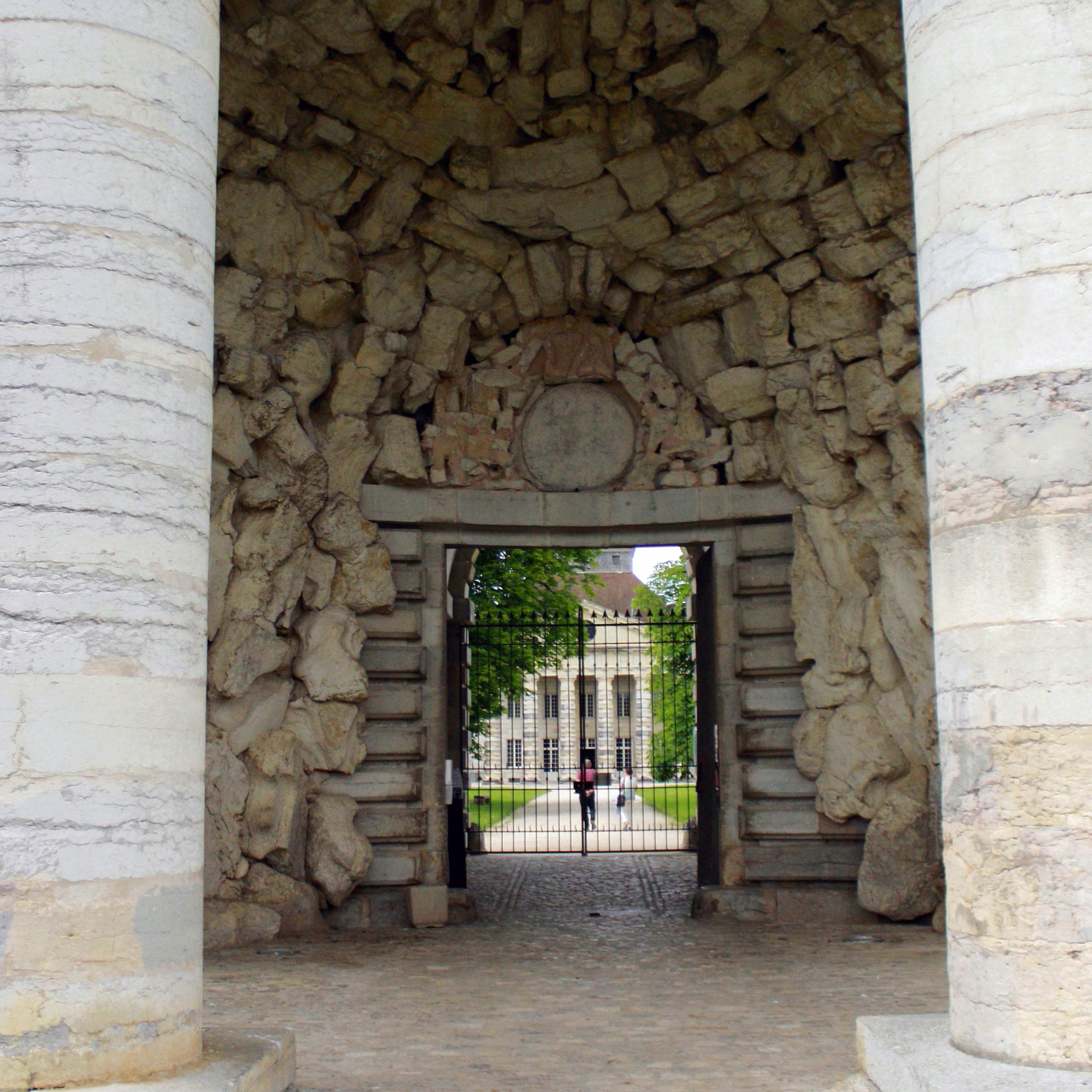 Saline royale d'Arc-et-Senans, département du Doubs: "Grotte" sous le péristyle du bâtiment d'entrée dans l'axe de la maison du directeur